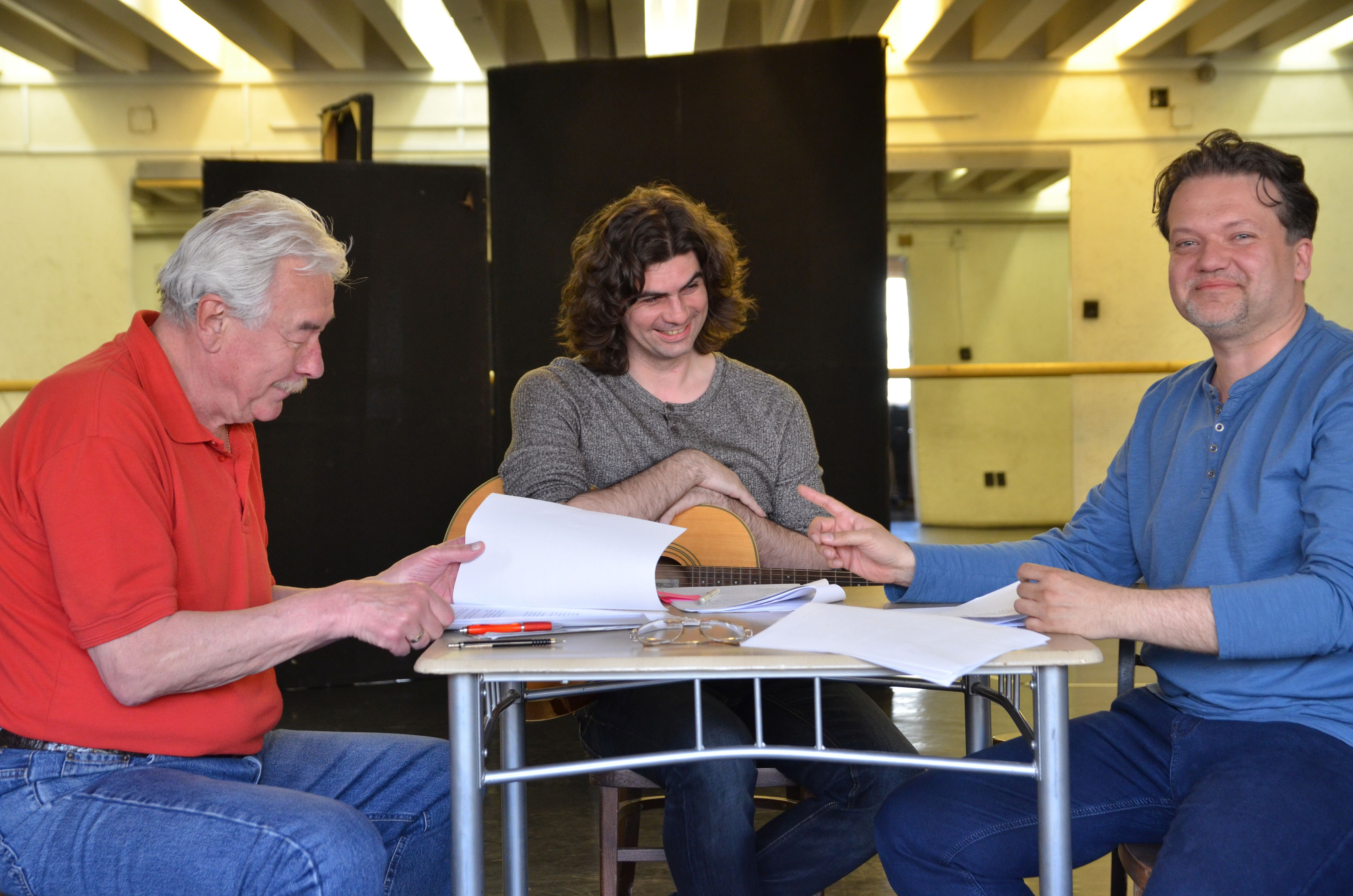 Katona János színművész (1949–2015), Dóka Attila zenész és Szabó Zoltán Attila rendező 2014-ben (Ottlik est, József Attila Színház)